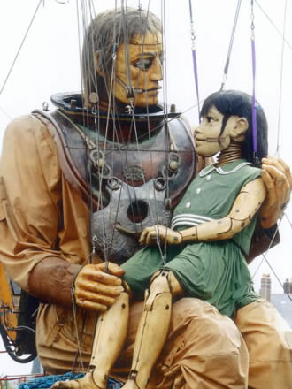 buena